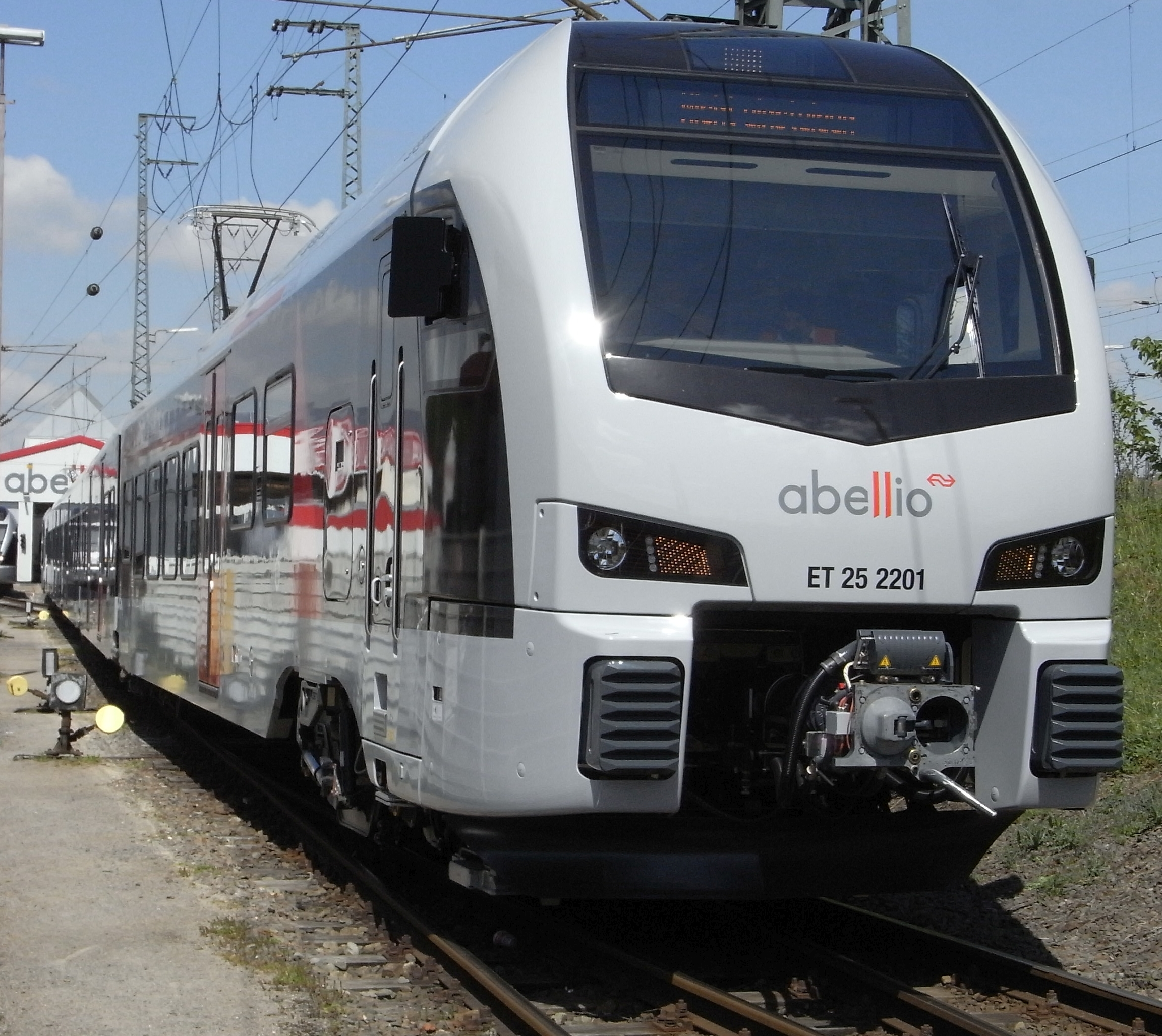 Ein Flirt 3 von Abellio Rail NRW im Bw Hagen-Eckesey